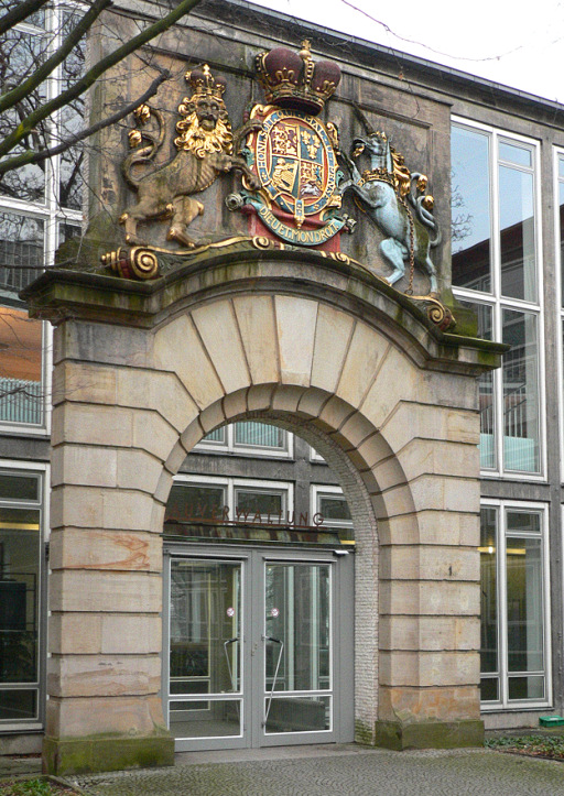 Denkmalgeschütztes Portal der Ulanenkaserne (Garde du Corps) vom Königsworther Platz in Hannover